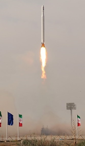 ماهواره نور